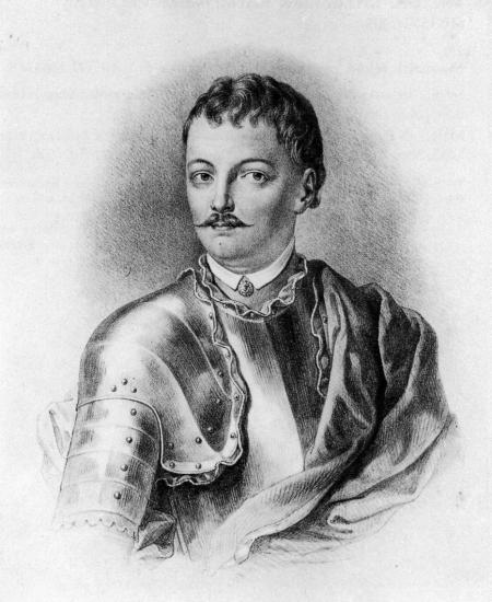 Jan Kazimierz Umiastowski or Rafael Leszczyński